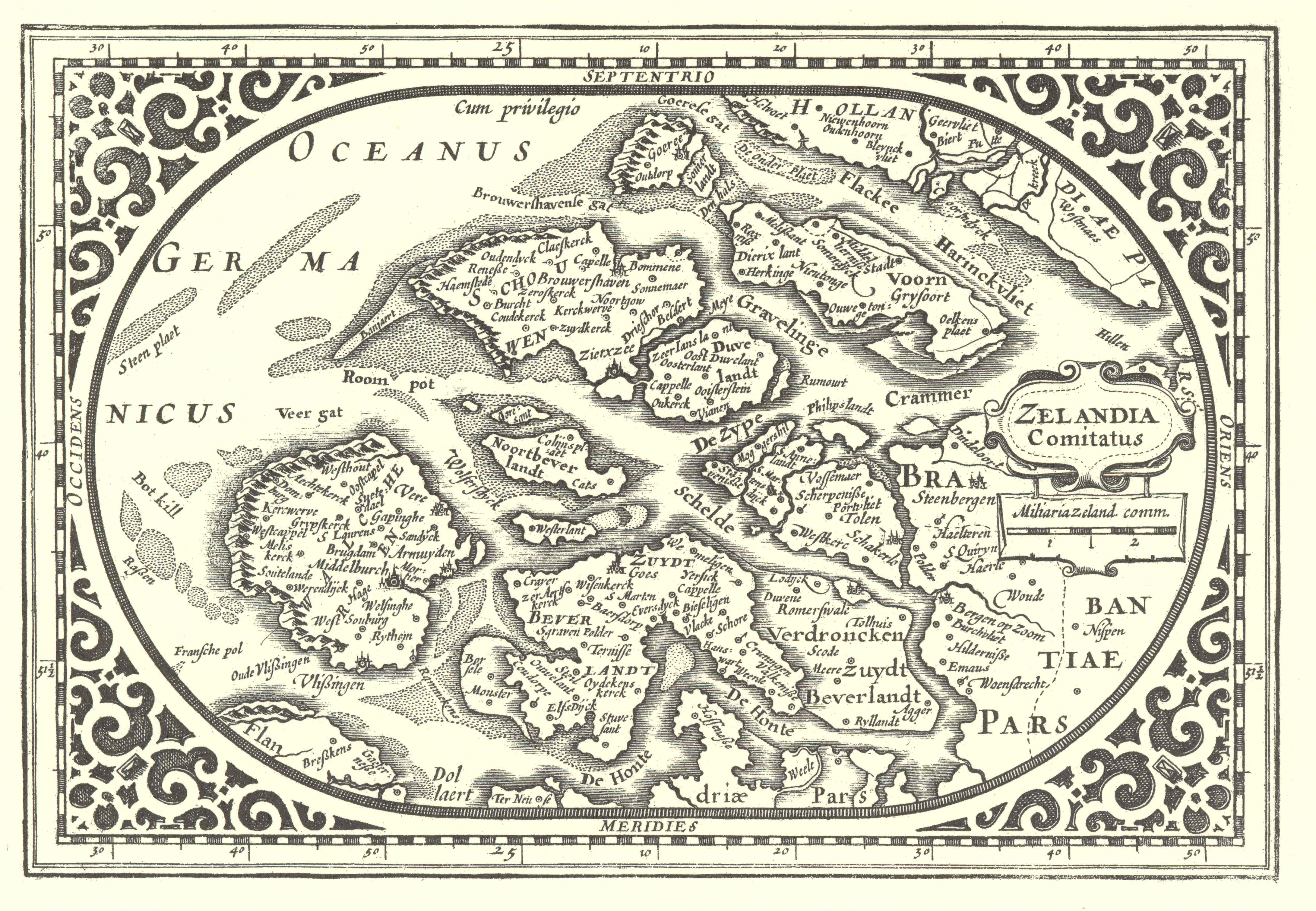 Kaart(je) van het graafschap Zeeland in het begin van de 17e eeuw